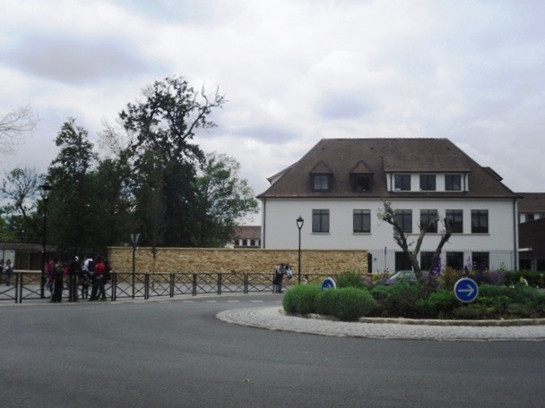 Le lycée de Montgeron (Essonne)